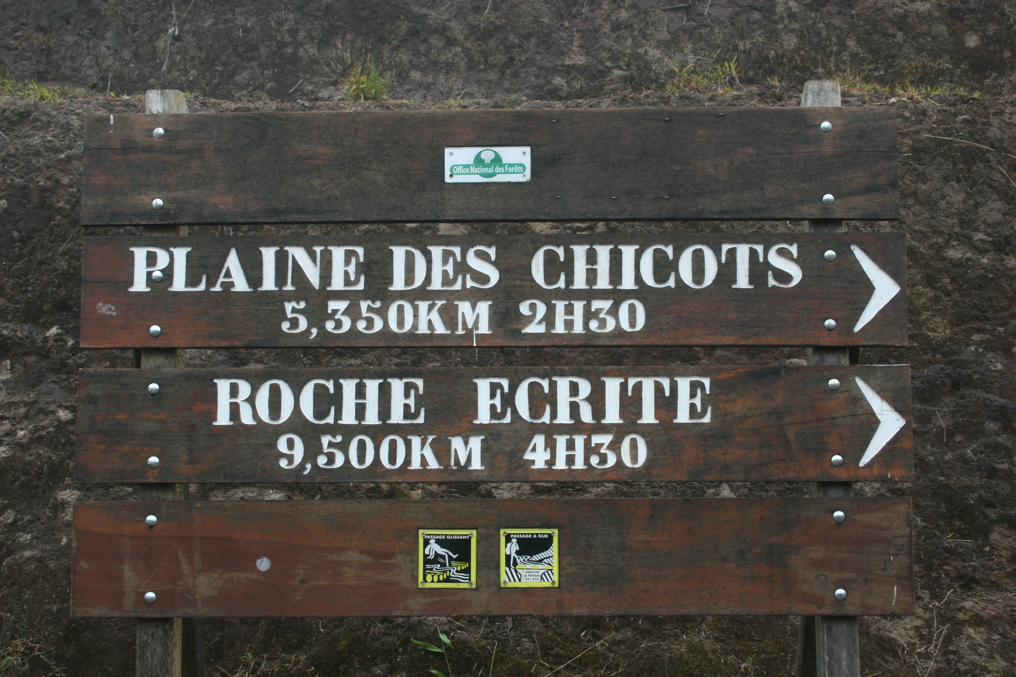 Panneau indiquant le départ du sentier vers la Plaine des Chicots à Mamode Camp, dans les Hauts de Saint-Denis de la Réunion